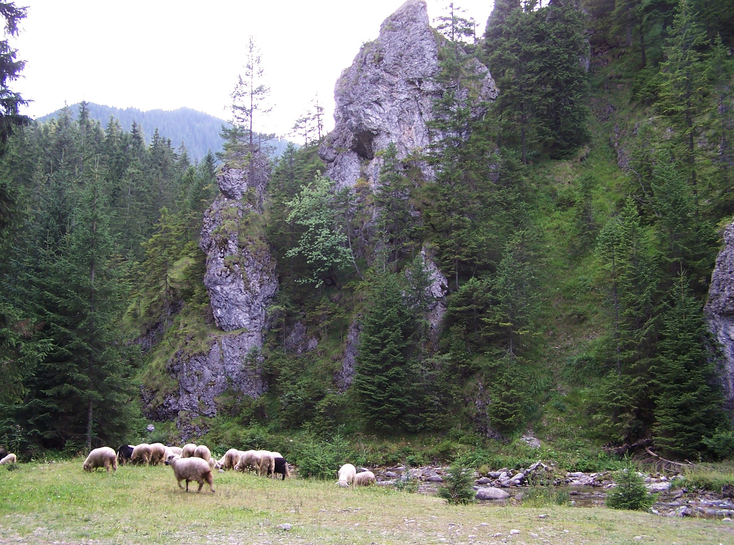 Dolina Chochołowska (West Tatra Mountains)